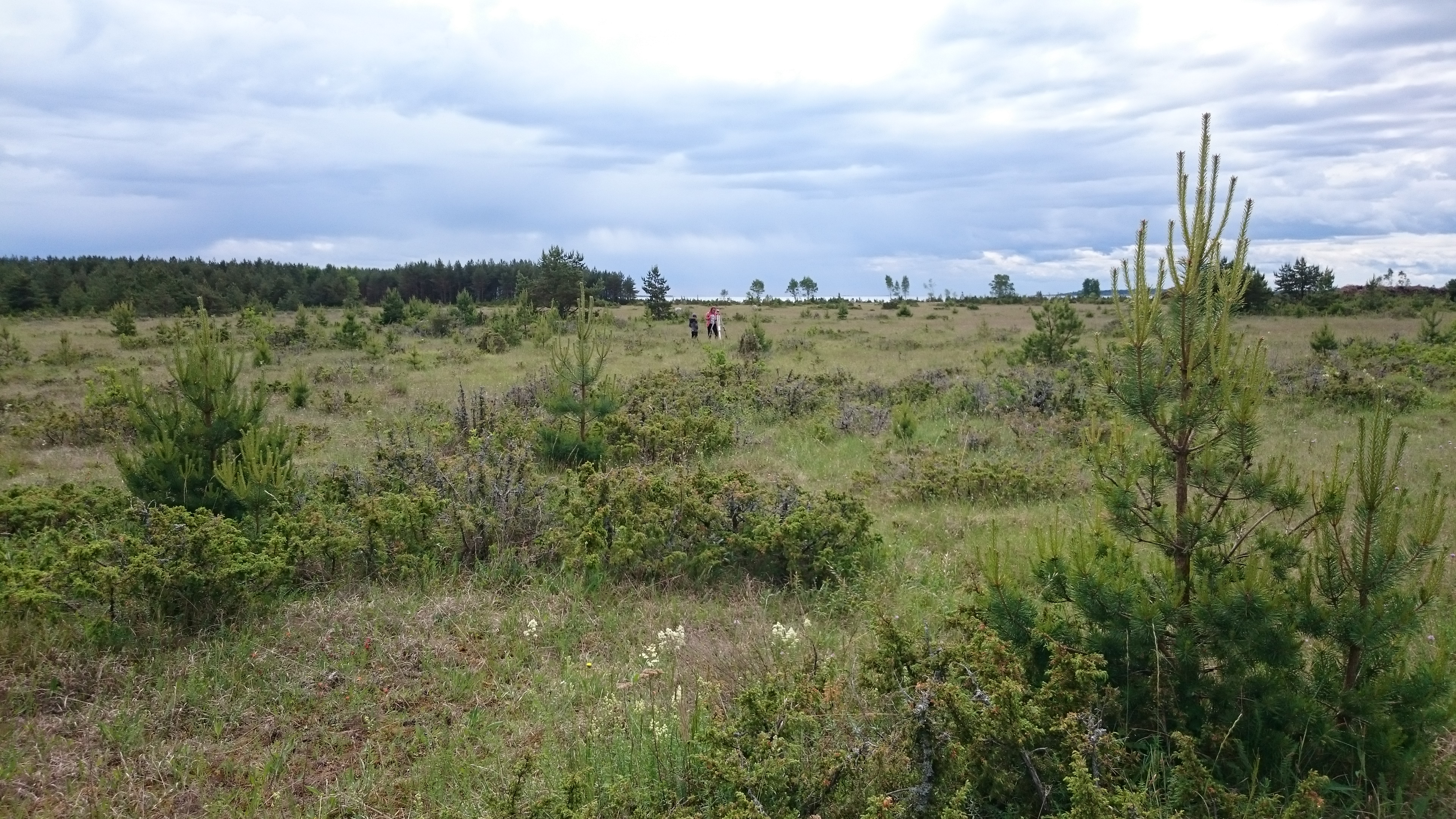 Sarve loopealne Hiiumaal